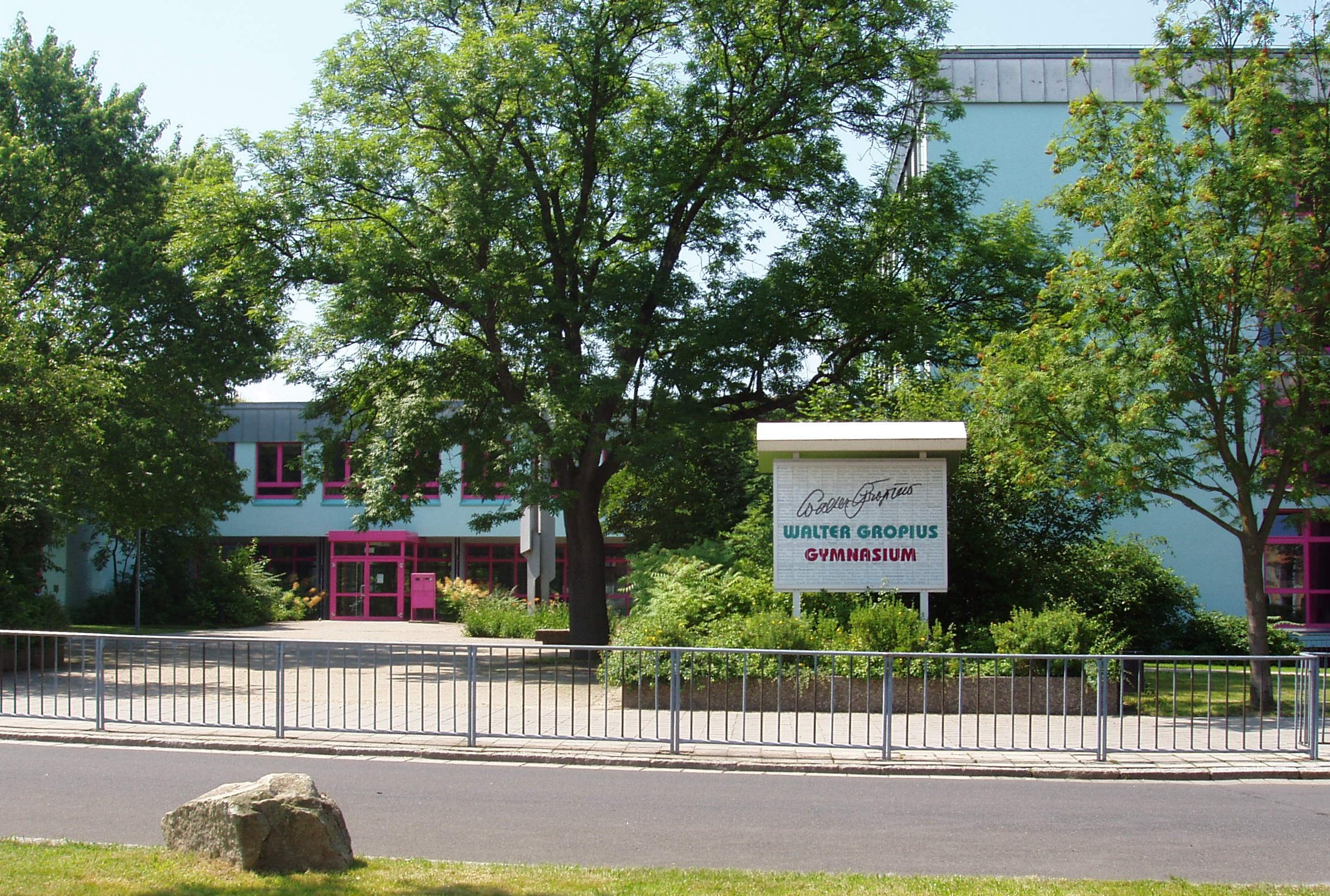 Gebäude des Walter-Gropius-Gymnasiums Selb